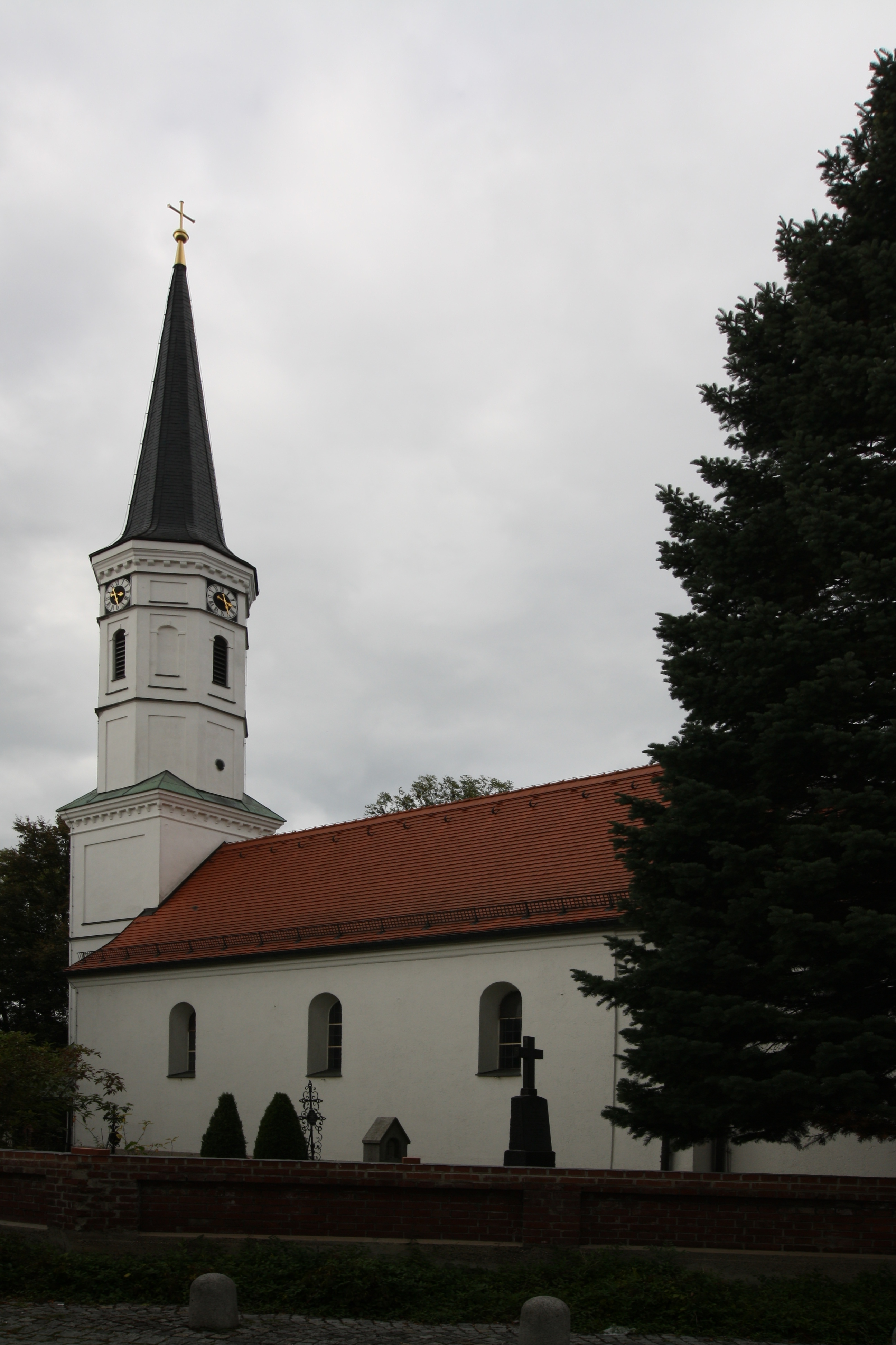 St. Martin, München-Riem